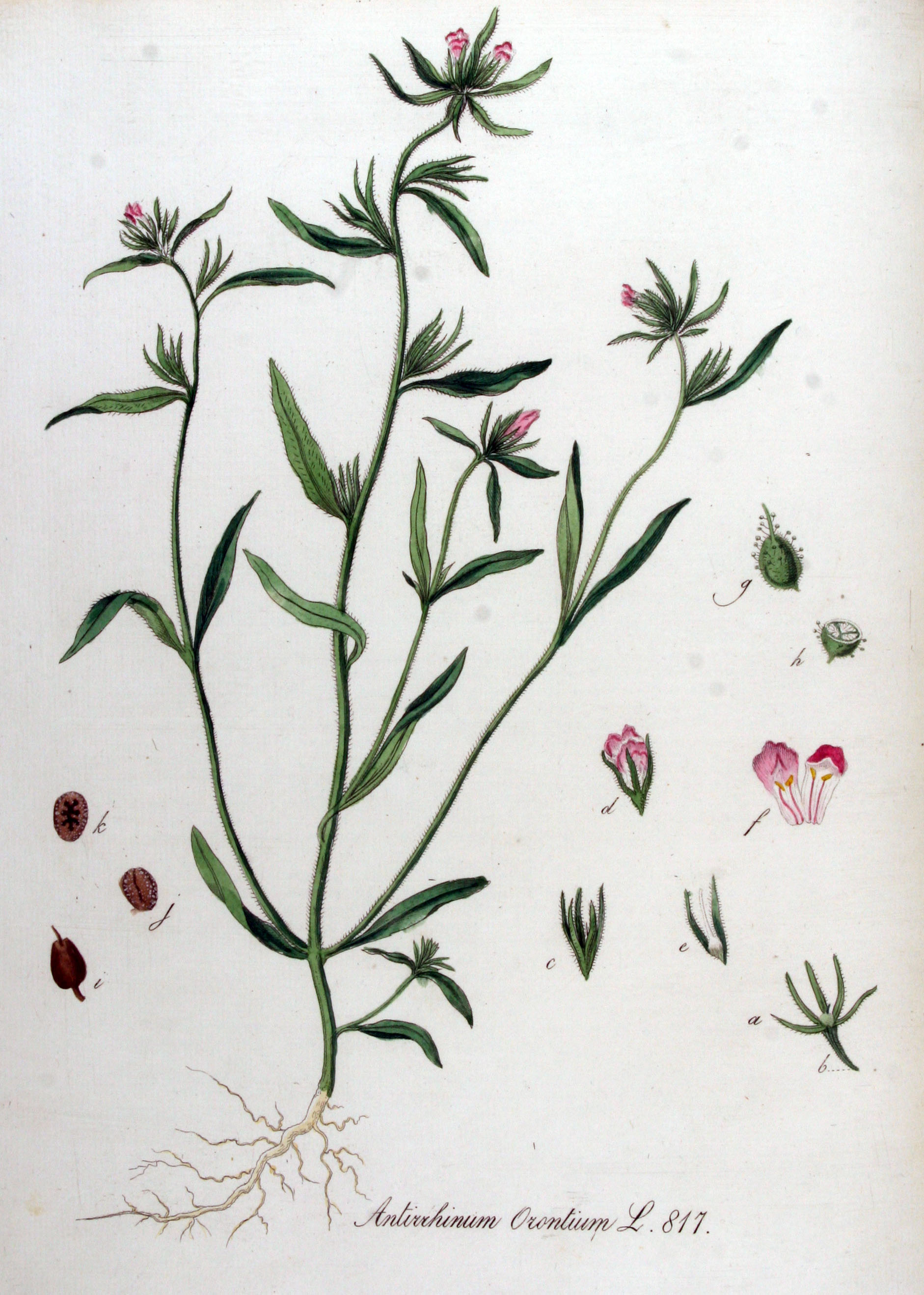 Misopates orontium (L.) Rafin. (Syn. Antirrhinum orontium L.)